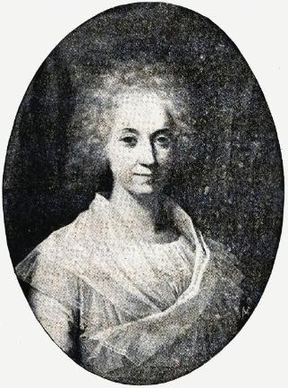 Fru M. G. Rosenkrantz. «Efter et Originalmaleri, tilhørende Fru Thea Ingier, Ljan.»